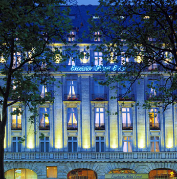 Excelsior Hotel Ernst bei Nacht